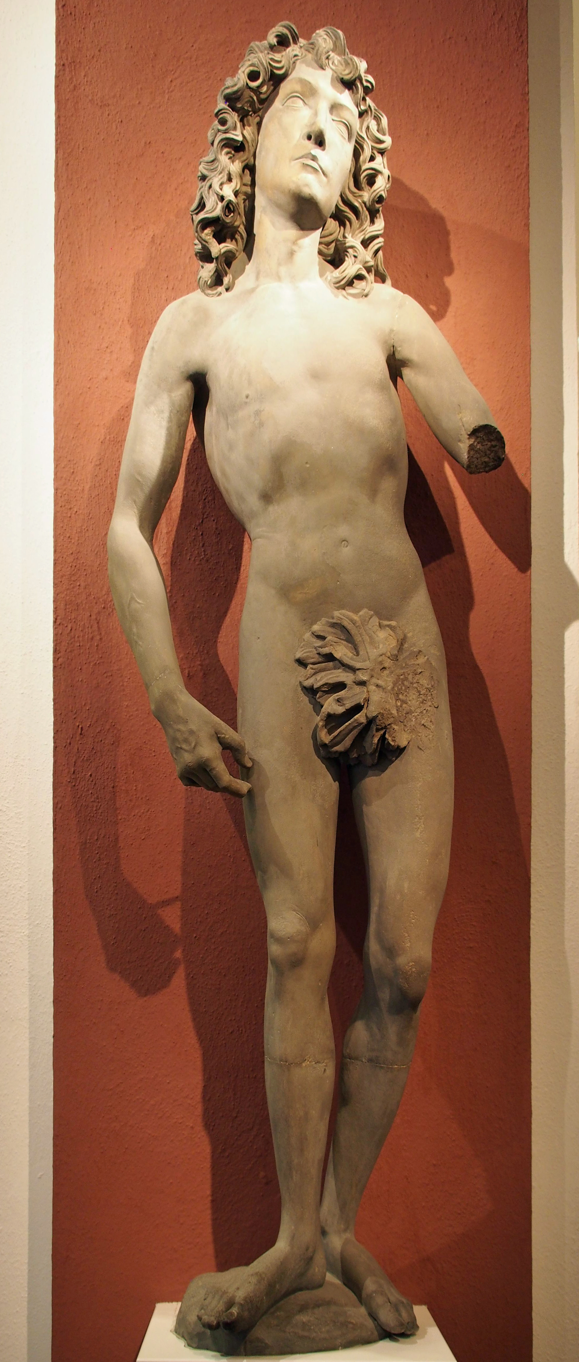 "Adam" Sandsteinfigur von Tilman Riemenschneider (1492-1493). Früherer Standort: linke Seite des Südportals der Würzburger Marienkapelle.